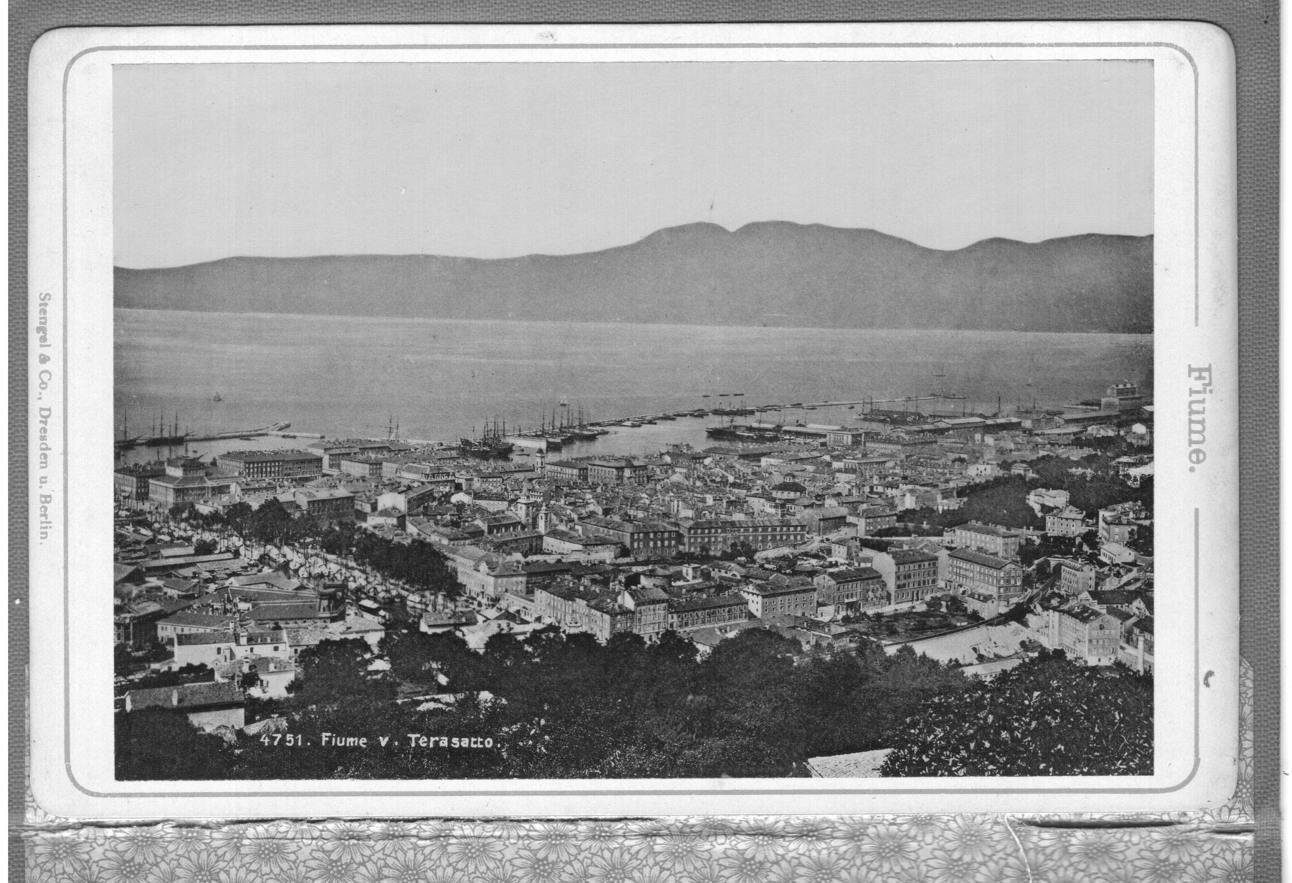 Magyar Királyság, Fiume. Edoardo Schambik fényképész. PD-old. A FIUME című fényképalbum 12, fehér vászonnal összefűzött fényképe közül az utolsó fénykép hátoldalára ragasztott kék-fehér bélyeg szövege a következő: EDOARDO SCHAMBIK FIUME Corso No 13. ©© Megjelent Creative Commons alatt a Metapolisz sorozatban. A Metapolisz sorozat valamennyi képe és filmje Creative Commons alatti valamint kereskedelmi - for profit - célra is felhasználható. Ajánlott hivatkozás: Derzsi Elekes Andor: Metapolisz DVD line ©© Published under Creative Commons in the Metapolisz DVD line. All of the photos and vids in the Metapolisz DVD line are under Creative Commons and can be used even for commercial – for profit – purposes. Recommended Citation Derzsi Elekes Andor: Metapolisz DVD line